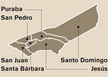 Mapa de los distritos del cantón de Santa Bárbara, provincia de Heredia, Costa Rica.